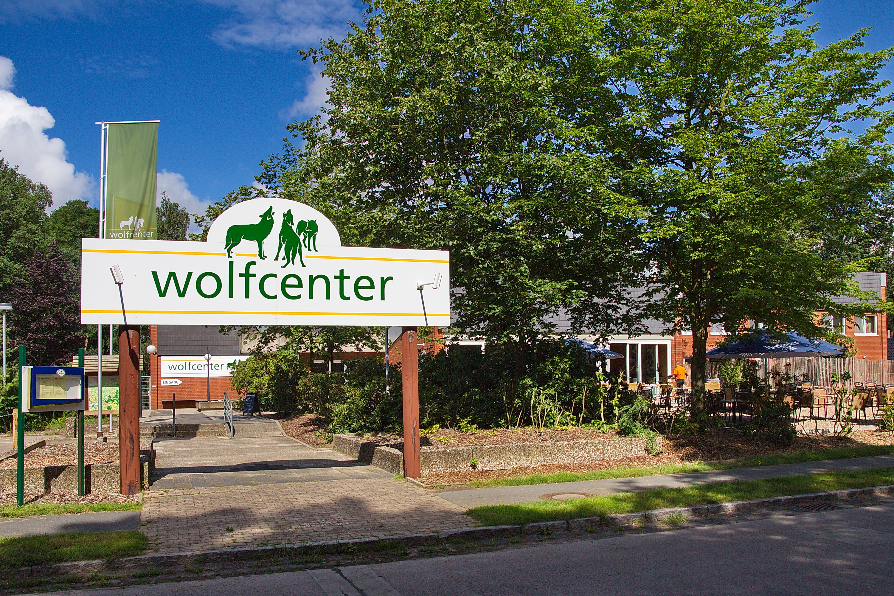 Wildpark "Wolfscenter" in Barme (Dörverden), Niedersachsen, Deutschland.